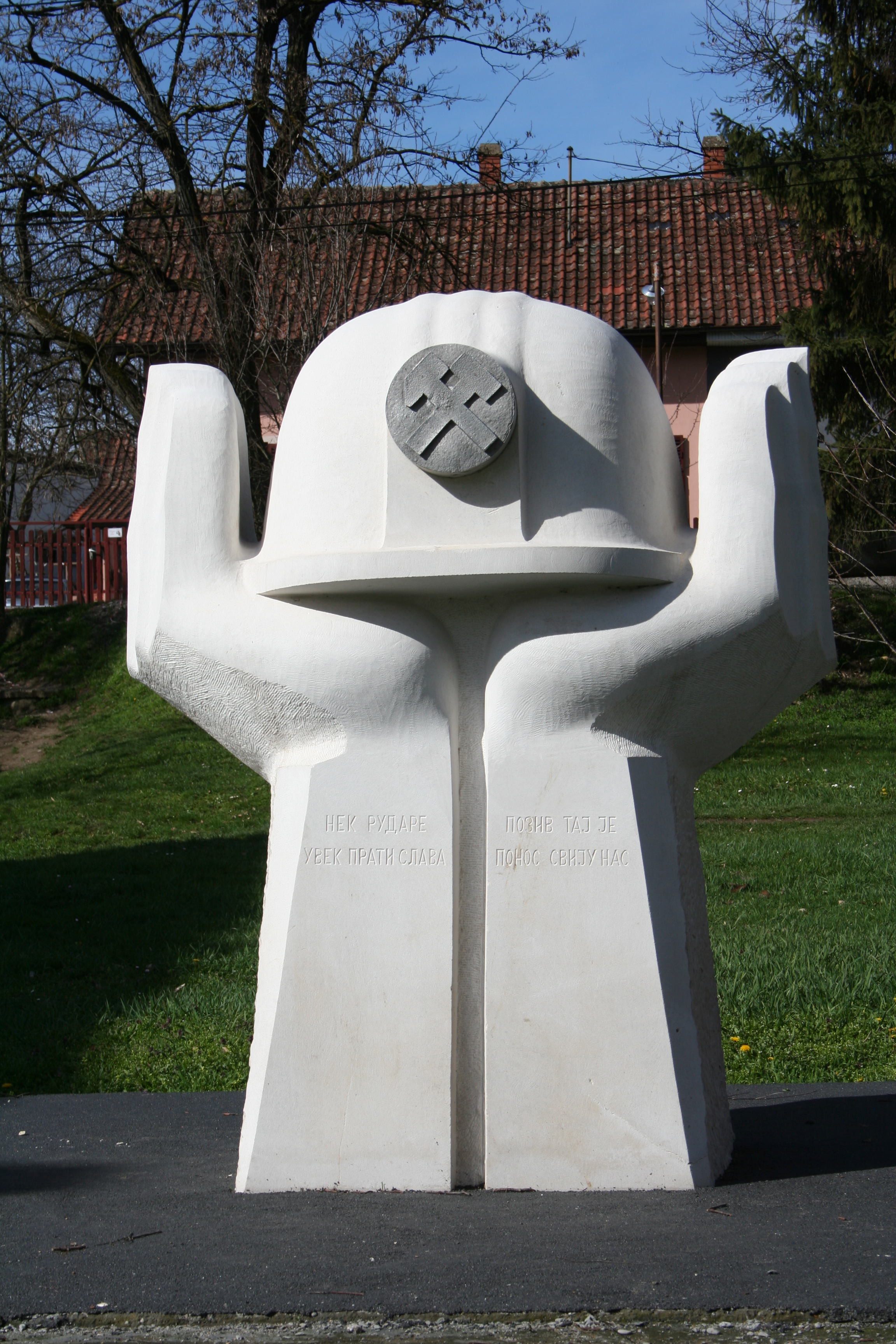 Vrdnik